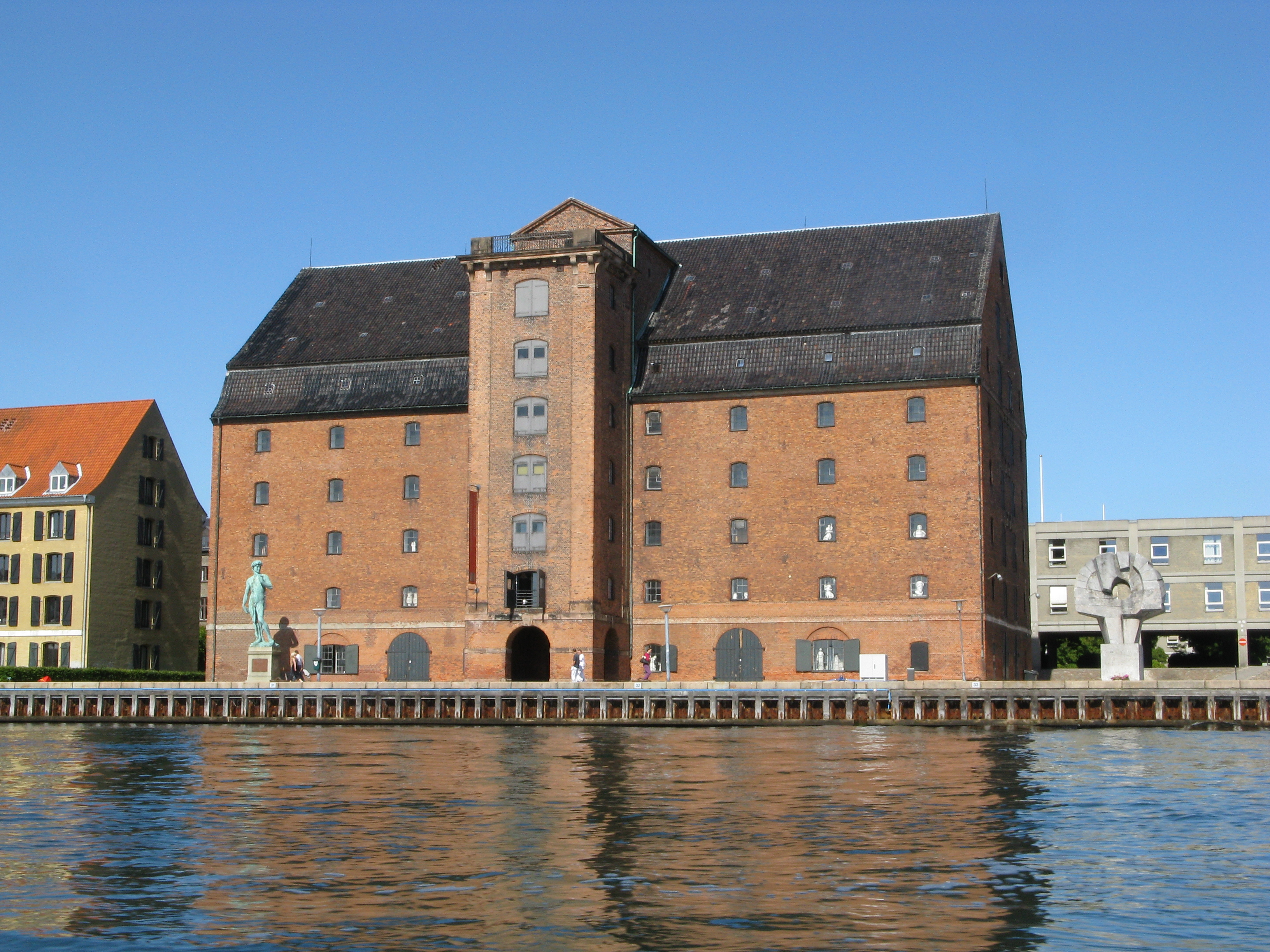 Vest Indisk Plads at Larsens Plads in Copenhagen, Denmark